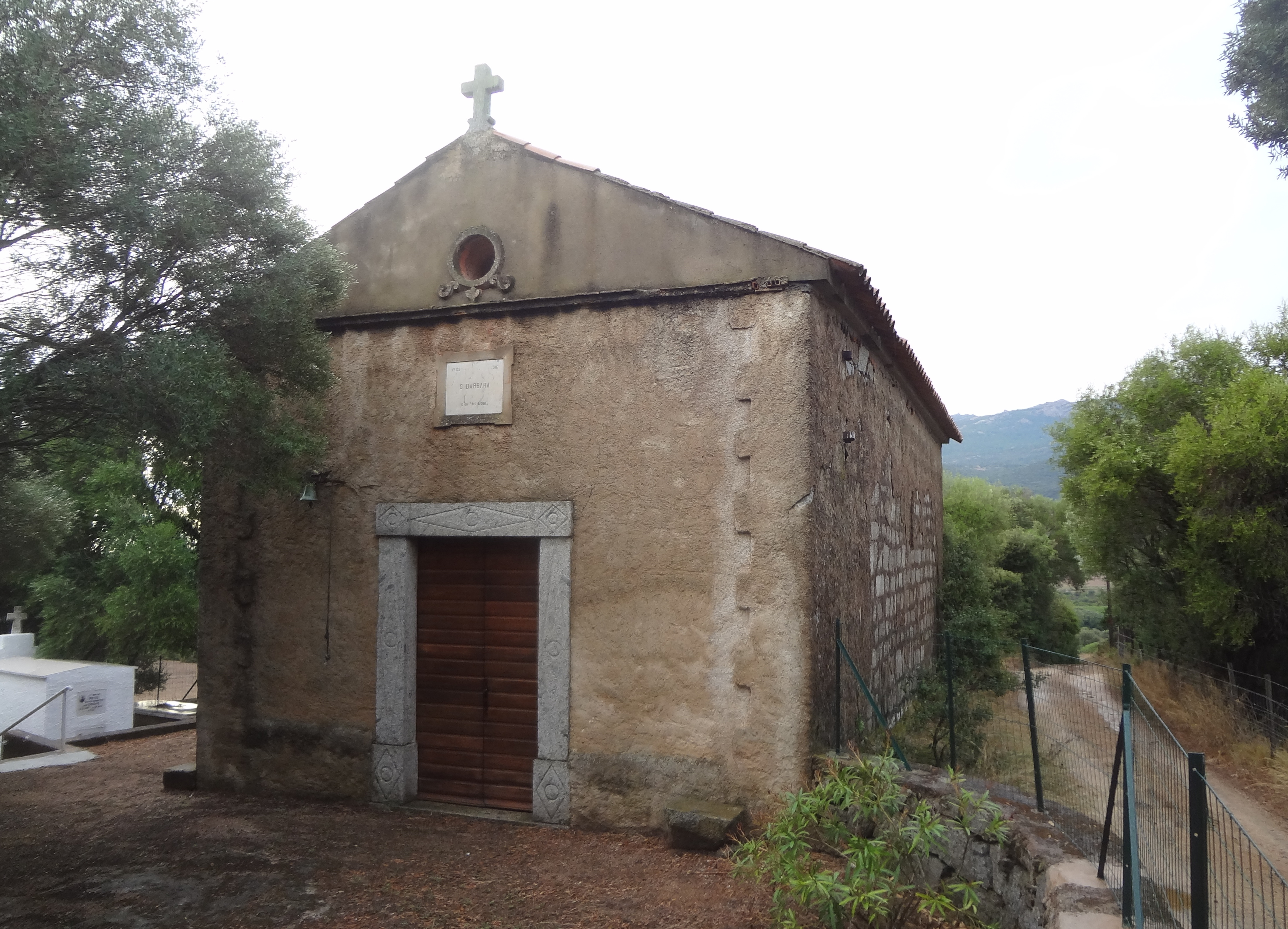 Chapelle Sainte Barbe de Pruno, Corse